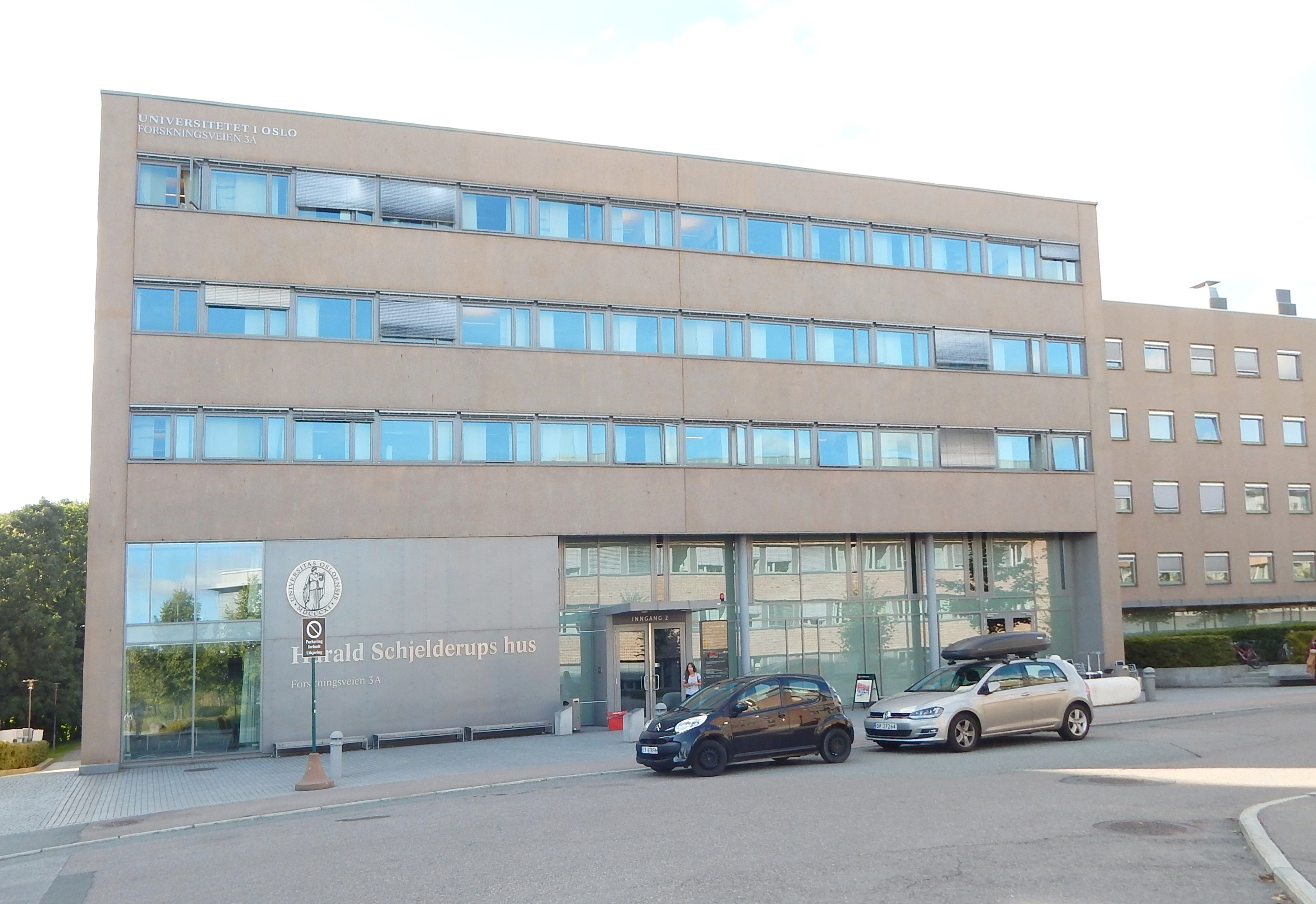 Harald Schjelderups hus, Universitetet i Oslo